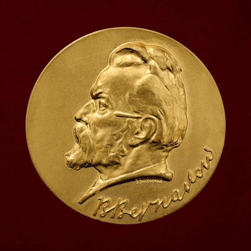 Медаль АН СССР «Владимир Иванович Вернадский». Присуждается за выдающиеся научные работы в области наук о Земле. Образец. Автор З. Виленский. Д.50 мм. Томпак. [1963 г.]. АРАН. Р-XIII. Оп.1. Д.111.